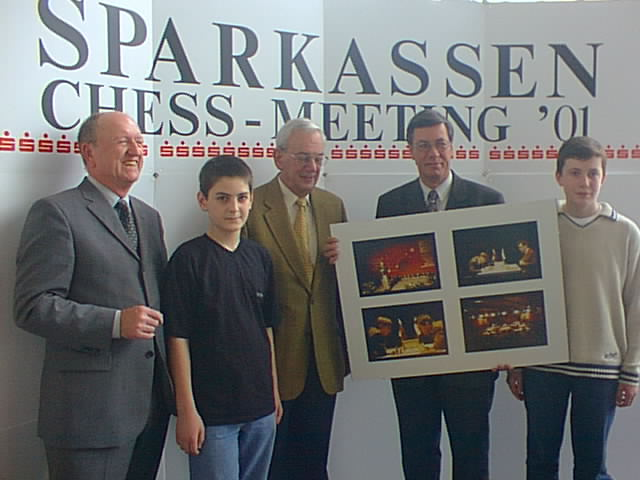 Würdigung der Verdienste von Egon Ditt bei Pressekonferenz der Dortmunder Schachtage 2001. Von links nach rechts: Helmut Kohls (Vorstandsvorsitzender Stadtsparkasse Dortmund), David Baramidze, Egon Ditt (Präsident Deutscher Schachbund), Dr. Gerhard Langemeyer (Oberbürgermeister Stadt Dortmund) und Arkadij Naiditsch, 14. Mai 2001 in Dortmund.